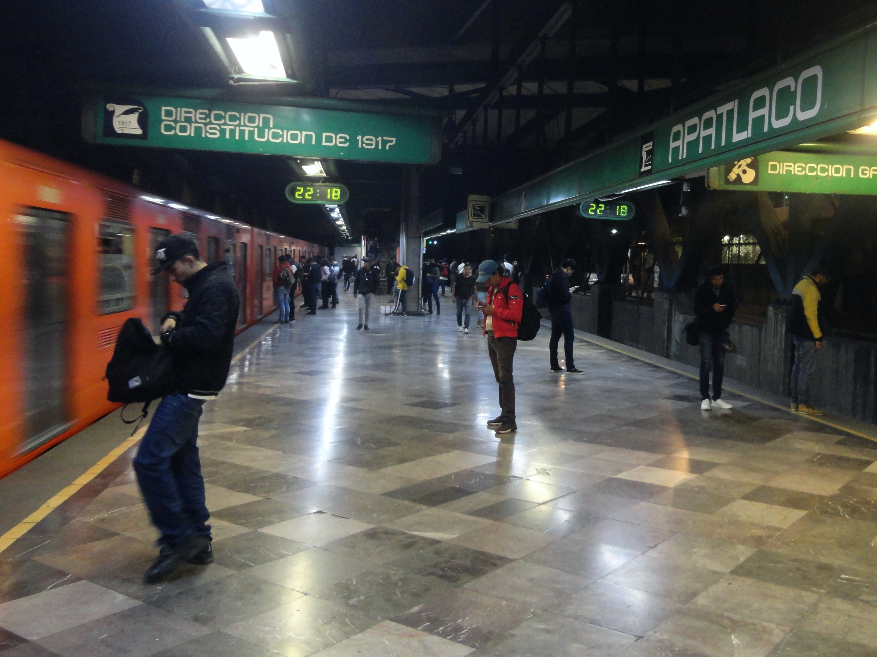 Estación Apatlaco - Línea 8 - Metro de la Ciudad de México